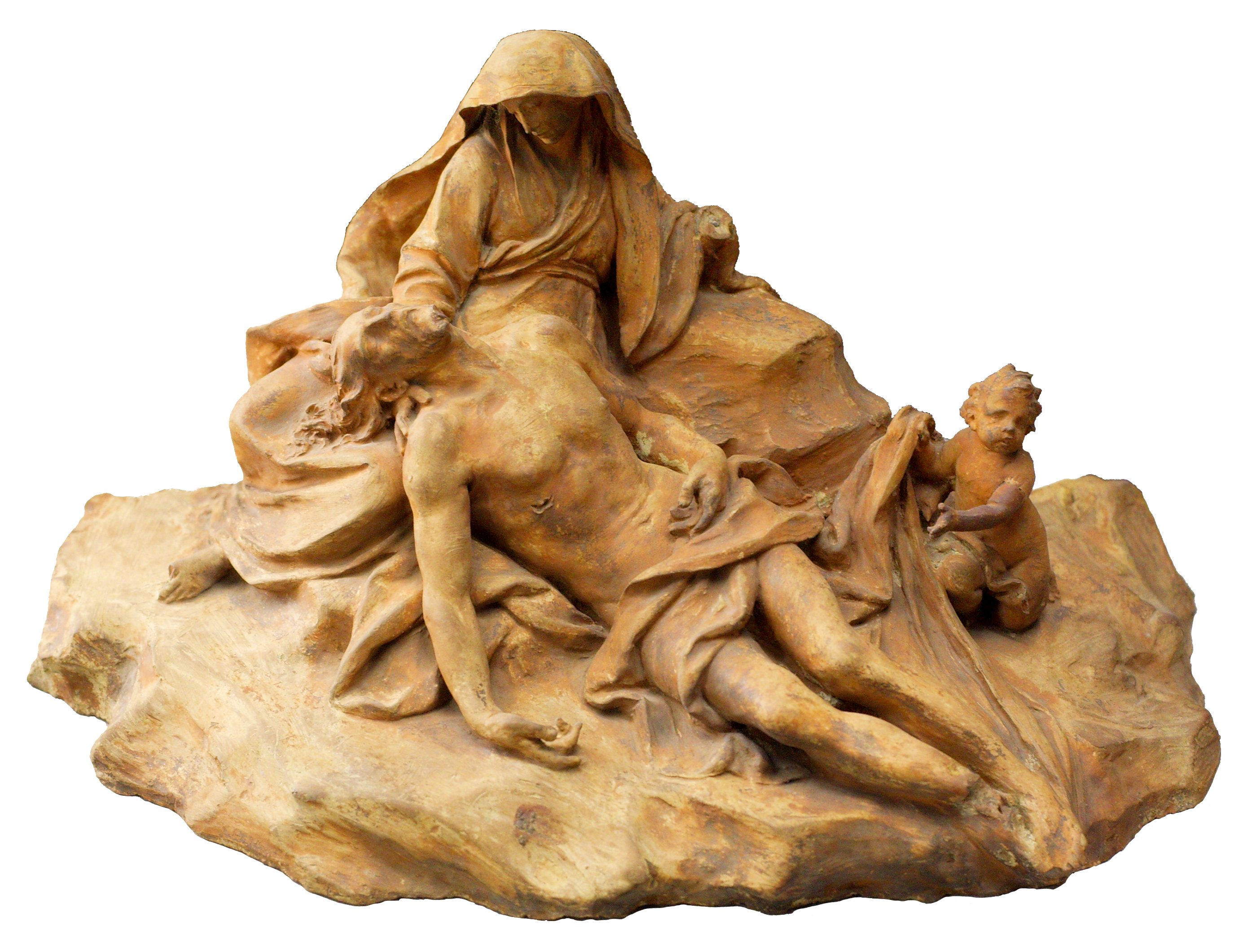 Modell einer Pieta von Johann Baptist Hagenauer. Fotografiert im Salzburger Barockmuseum.